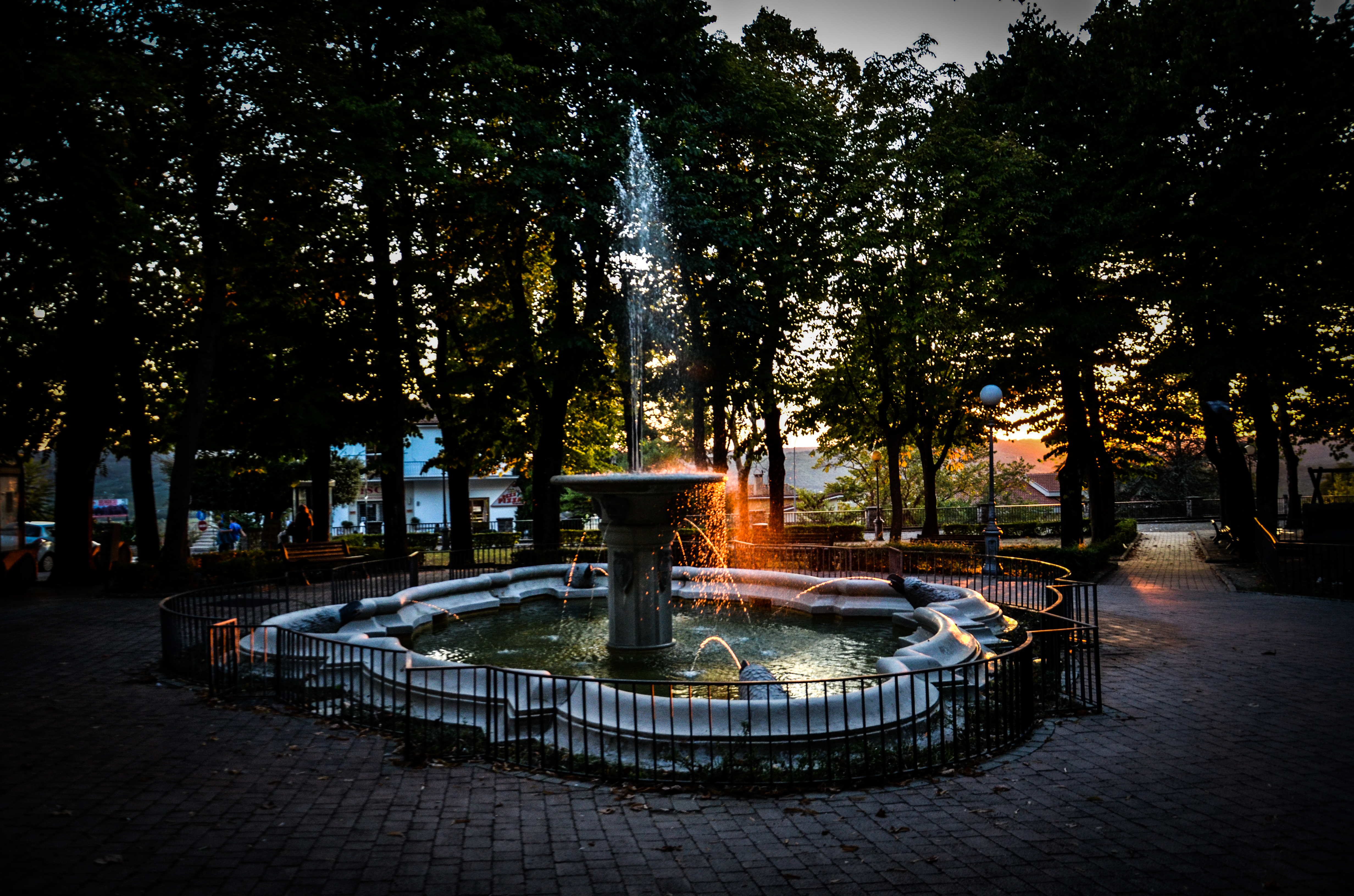 Giardini Pubblici This is a photo of a monument which is part of cultural heritage of Italy.